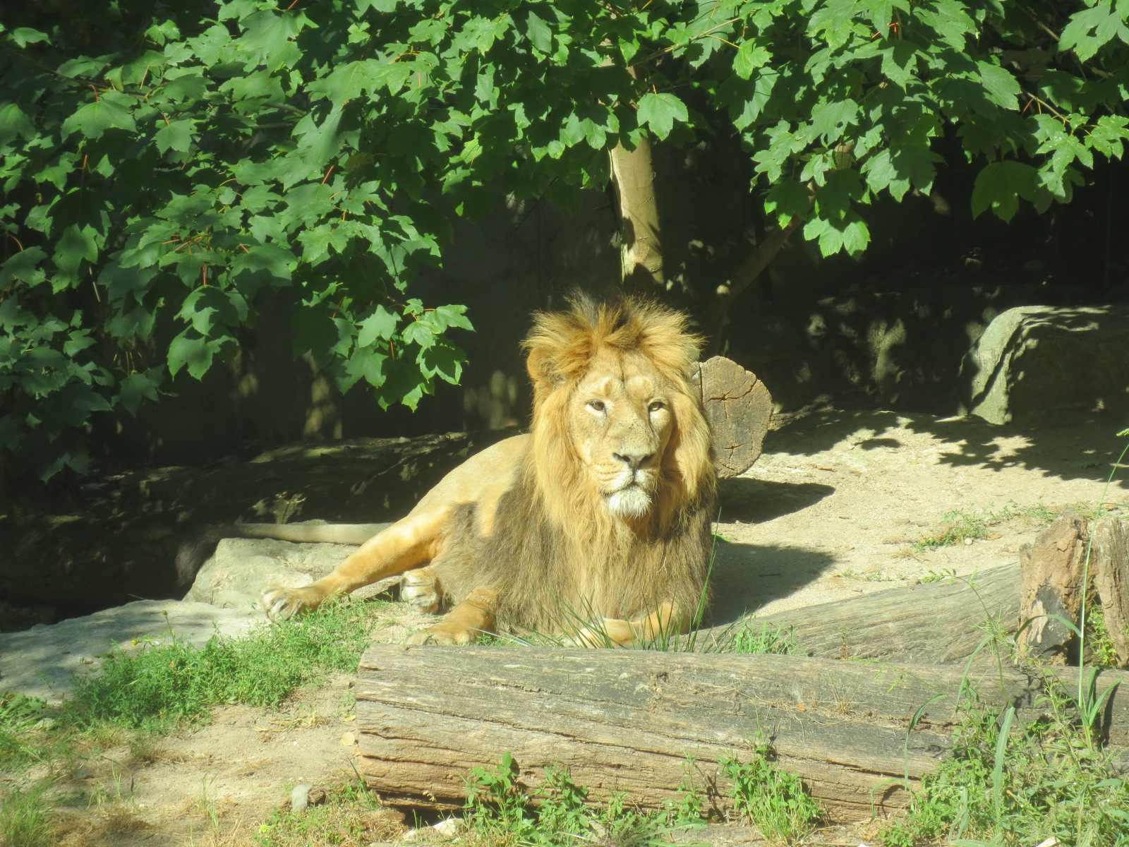 Parc zoologique de Mulhouse, lion d'asie